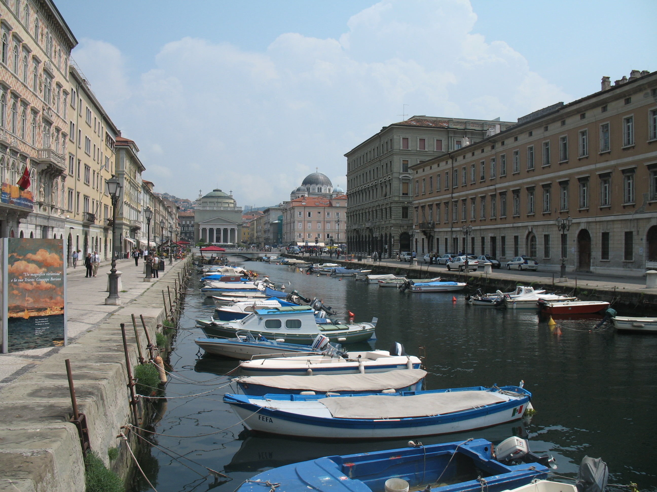 Immagine da Trieste, Friuli-Venezia Giulia, Italia.